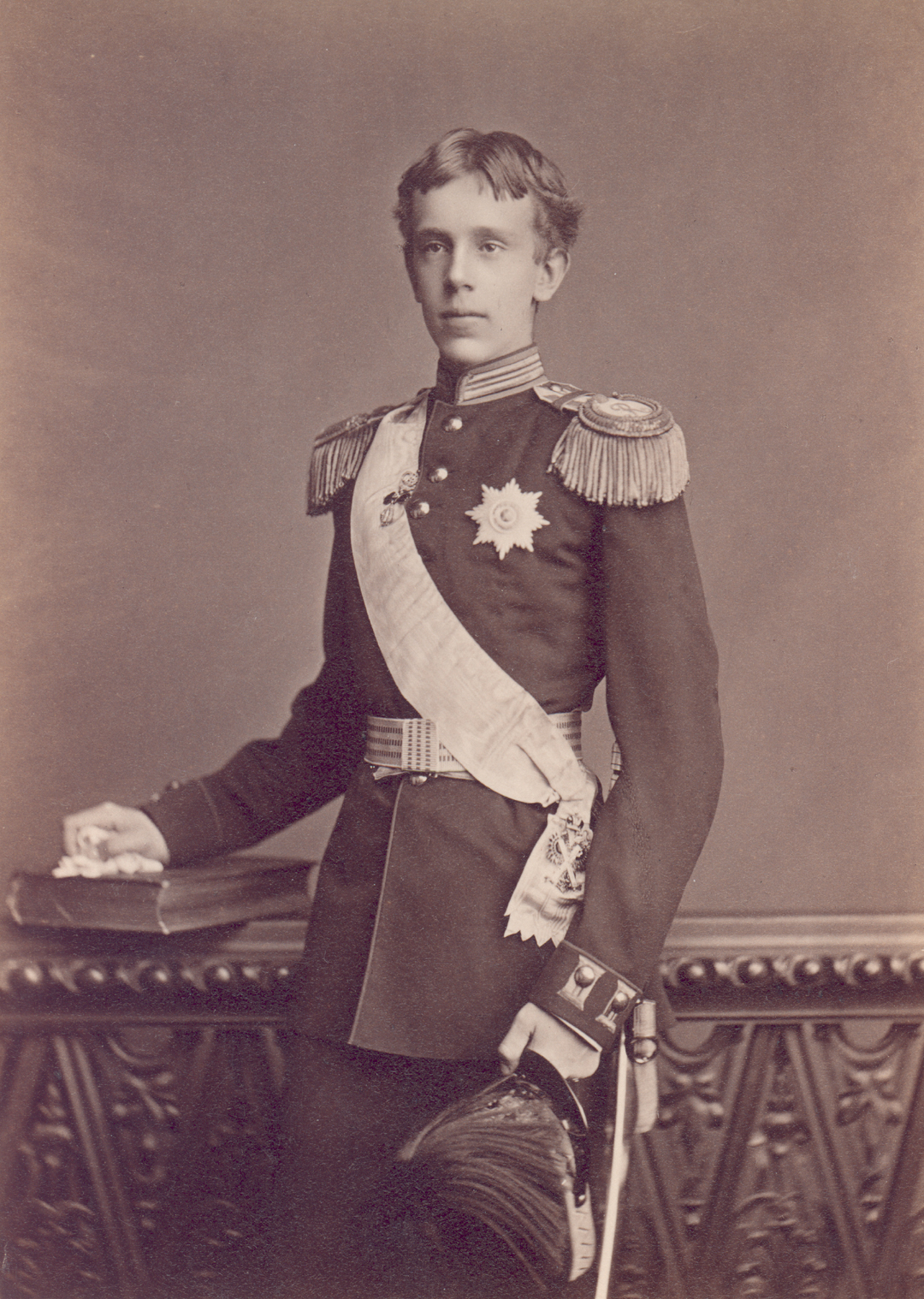 Kronprinz Rudolf in Uniform